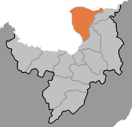 Map of Samjiyon, Ryanggang-do, DPRK, 2006